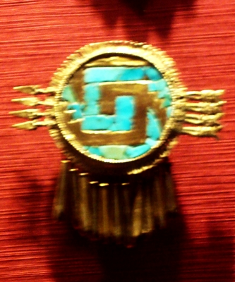 Escudo de Yanhuitlán. Pieza de orfebrería mixteca realizada en oro con incrustaciones de turquesa. Procede de Yanhuitlán (México). Cultura mixteca, período Posclásico (ss. X-XVI). Colección del MNA de la ciudad de México.